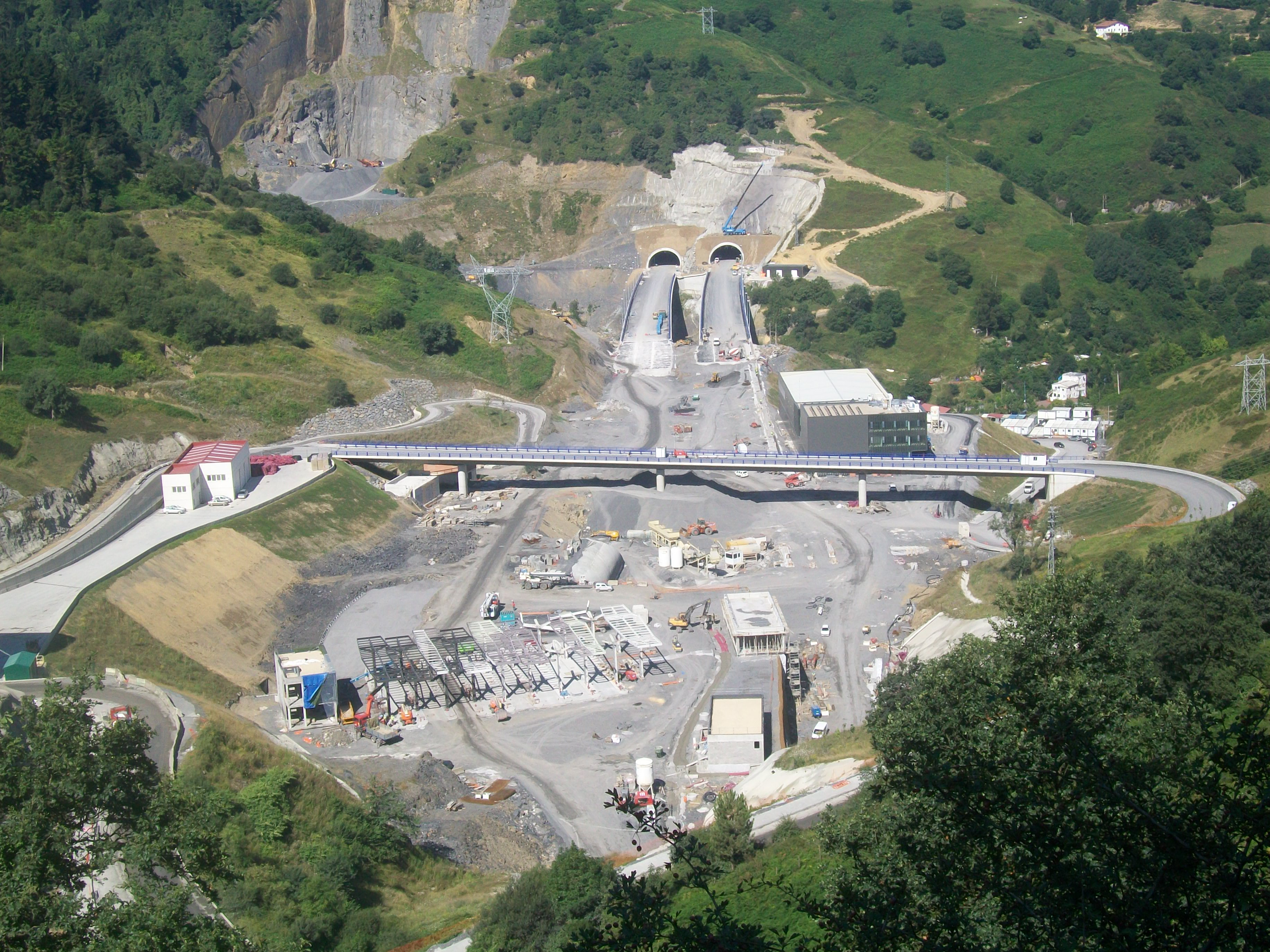 Peaje de El Peñaskal (obras Supersur)